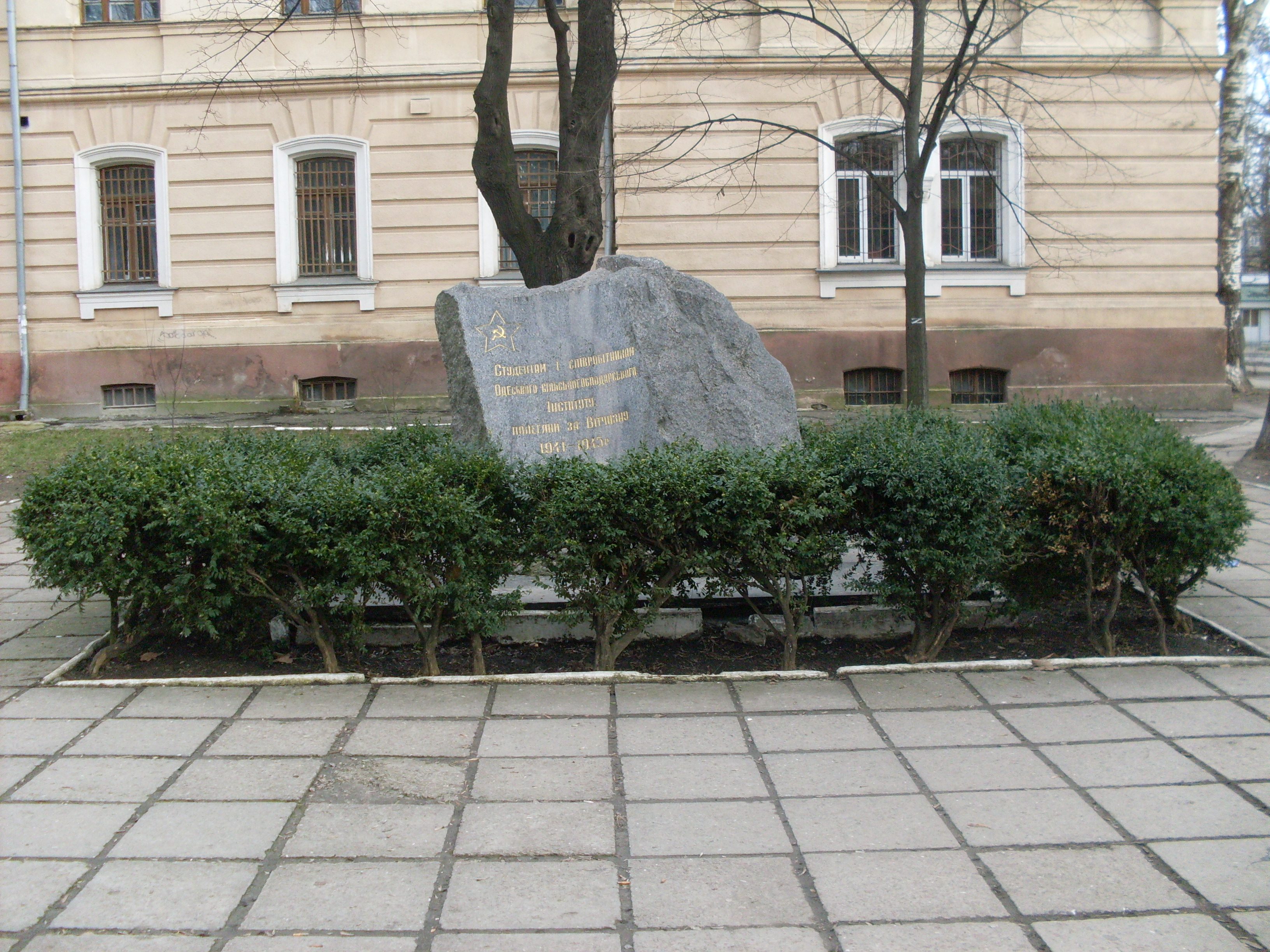 Пам’ятник студентам, викладачам і співробітникам сільгоспінституту, загиблим на фронтах Великої Вітчизняної війни; Канатна, 99